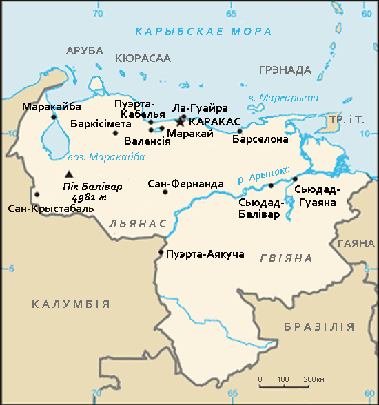 Карта Венесуэлы